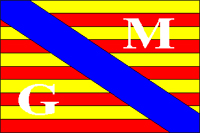 toestemming via mail op 3april tot publicatie van: Filip van Laenen